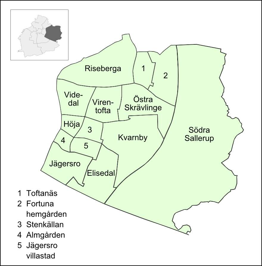 Delområden i Husie, Malmö 2009